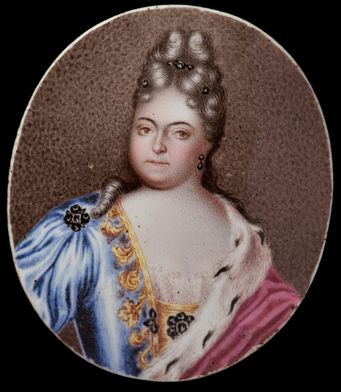 Портрет царевны Натальи Алексеевны. 1715 г. Золото, эмаль. Работа Григория Семеновича Мусикийского.